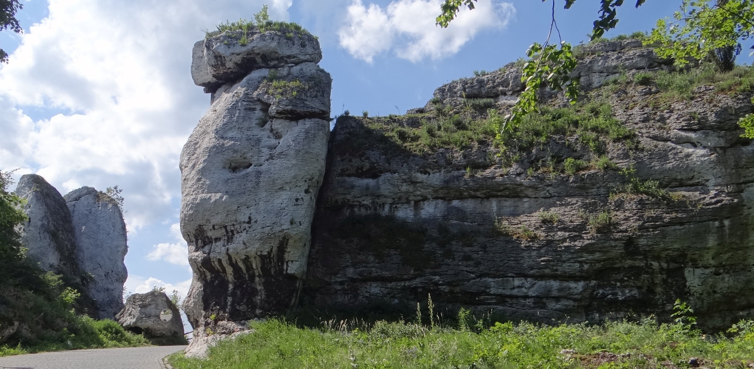 Grań za Kapeluszem w Podzamczu